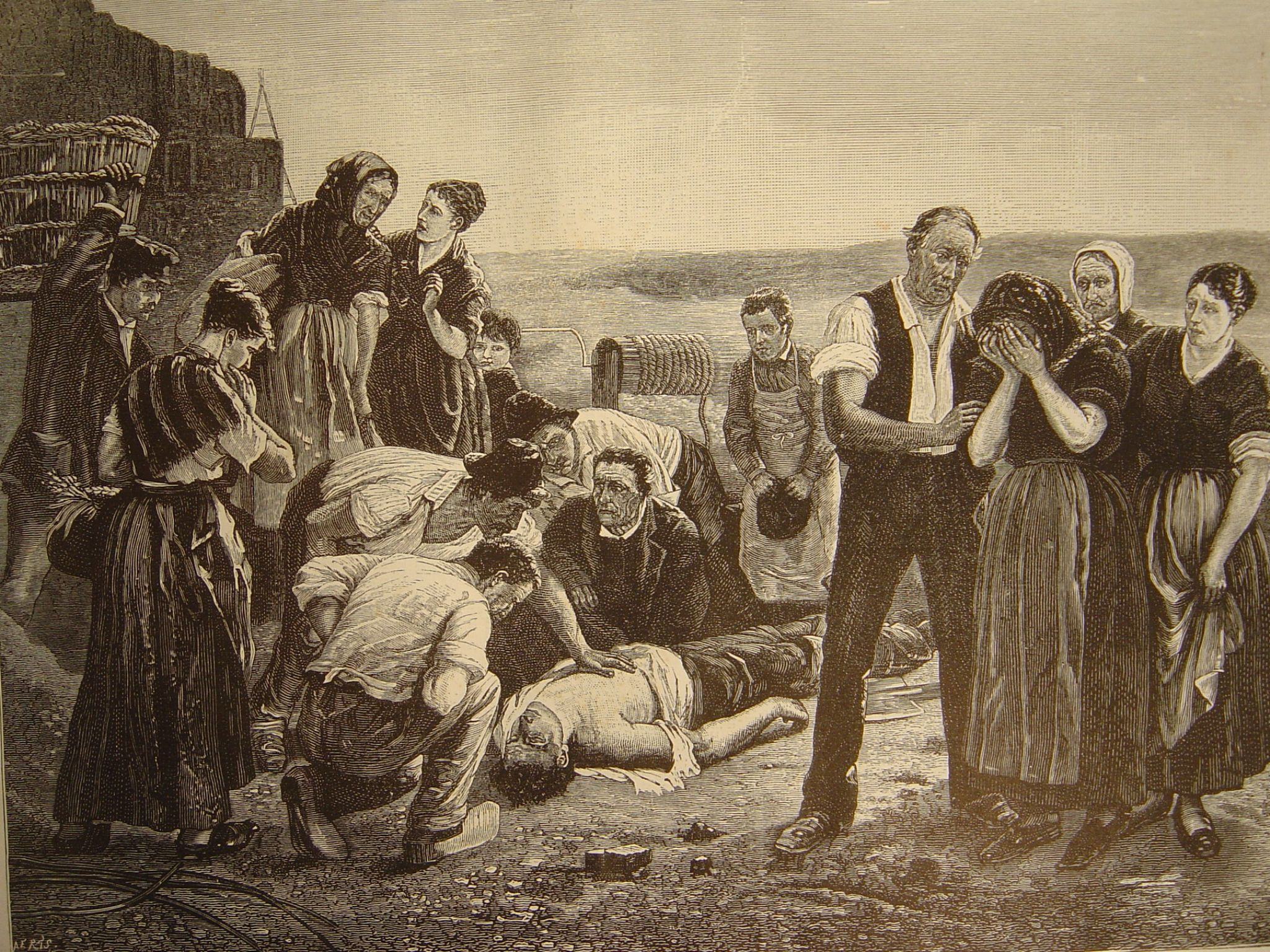 Un maçon travaillant dans l'intérieur d'un puits : soudain le sol mouvant et sablonneux cède , renverse les étançons et renferme le travailleur.Tous les secours ont été inutiles . Le corps inanimé est là , étendu sur la terre , au milieu d'hommes et de femmes. On cherche si quelque battement de coeur ne viendra pas donner un peu d'espoir de vie. Les physionomies de tous les personnages sont d'une expression réunissant à la variété une vérité frappante